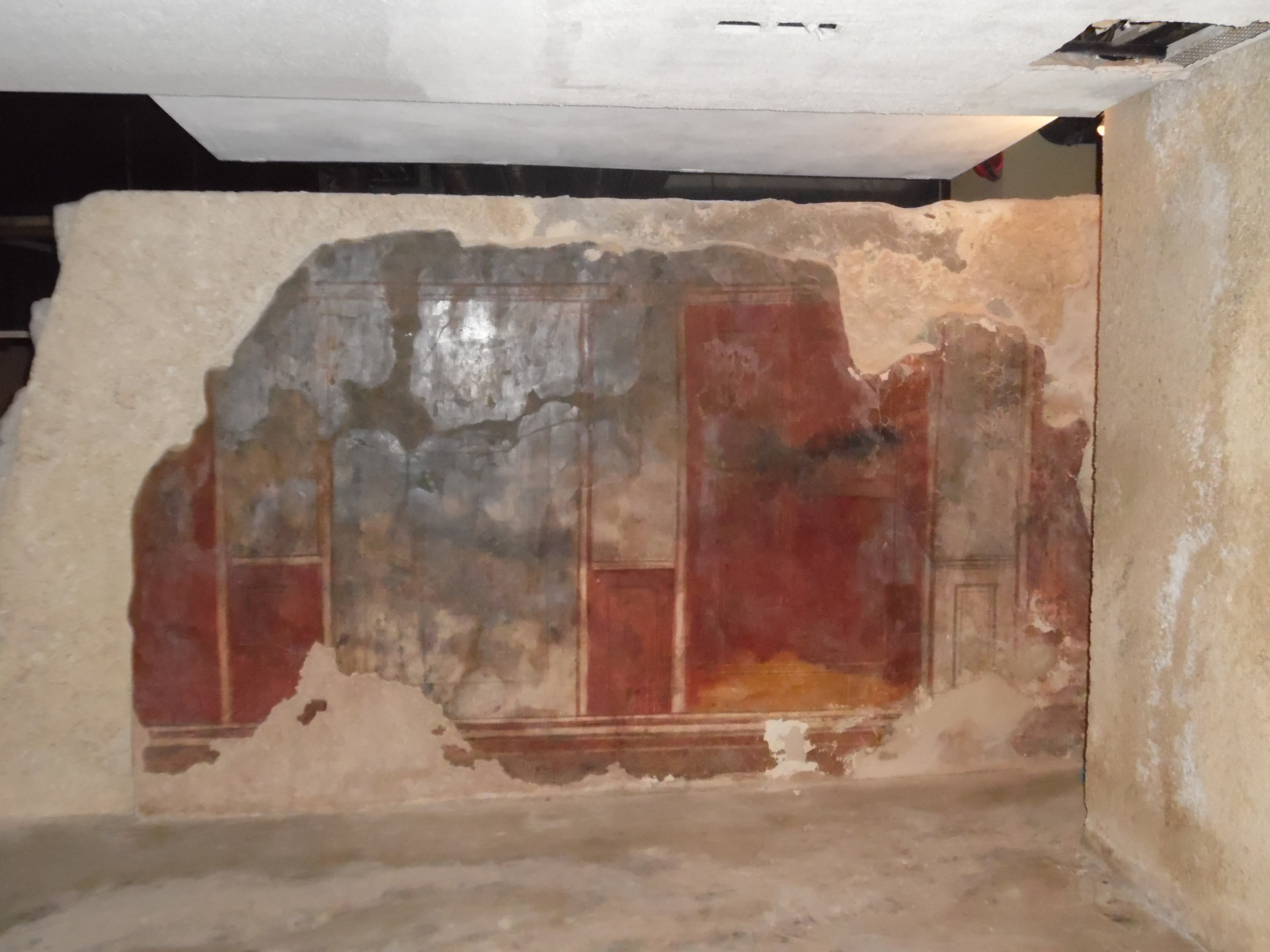 מוזיאון וואהל לארכאולוגיה - הפרוור ההרודיאני הוא מוזיאון ברובע היהודי בעיר העתיקה בירושלים אשר נבנה על שרידיהם של בתי פאר מהעיר העליונה בימי המלך הורדוס ומציג בין היתר מקוואות, פסיפסים, כלי בית וחפצי אמנות בני התקופה.